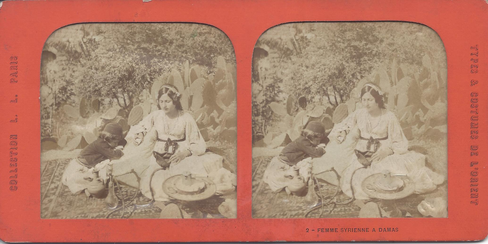 Ludovico Wolfgang Hart: Jüdin mit Kind aus Damaskus im Garten. Stereokarte der Collection Levy & Leon um 1870, transparent mit Kolorierung und Schlitzung.